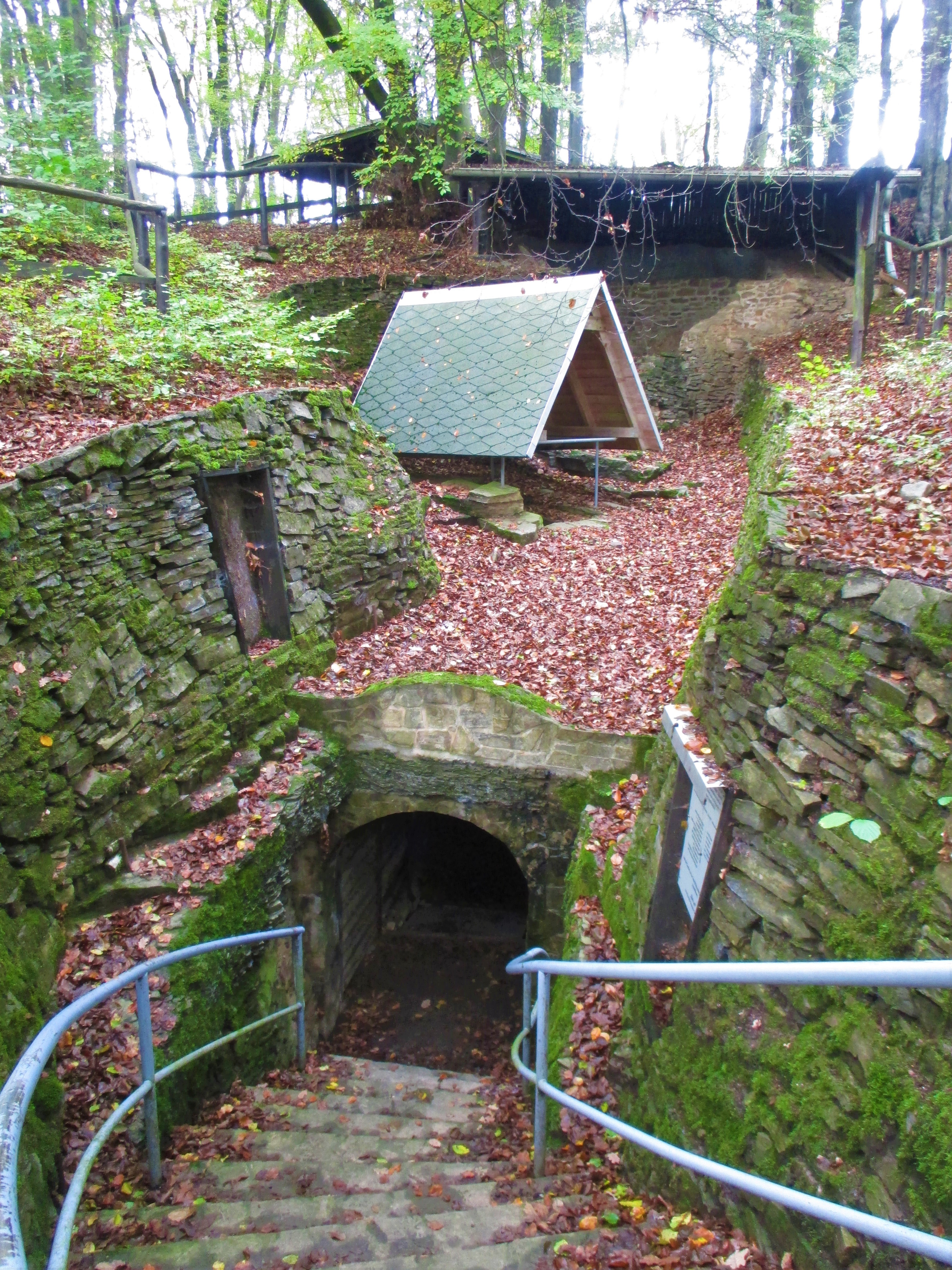 Mundloch am Bergbaulehrpfad Wettelrode, Stadt Sangerhausen, Landkreis Mansfeld-Südharz